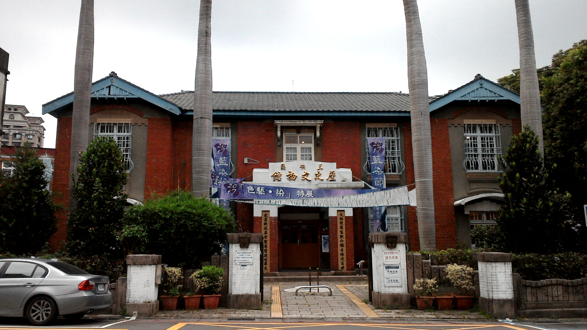 三峽區歷史文物館,新北市三峽區永館里